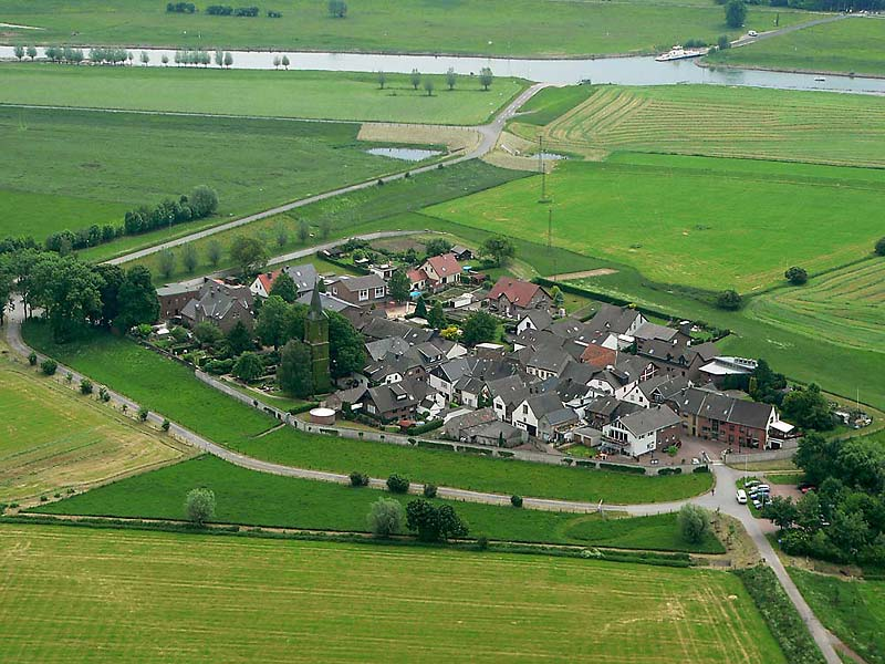 Schenkenschanz von Norden aus gesehen, Mai 2008; Grünlandbereiche und Altrhein im Naturschutzgebiet „Salmorth“